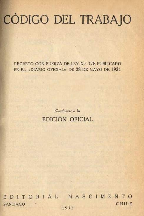 Primer Código del Trabajo de Chile. Decreto con fuerza de ley n.º 178. Publicado en el Diario Oficial de 28 de mayo de 1931